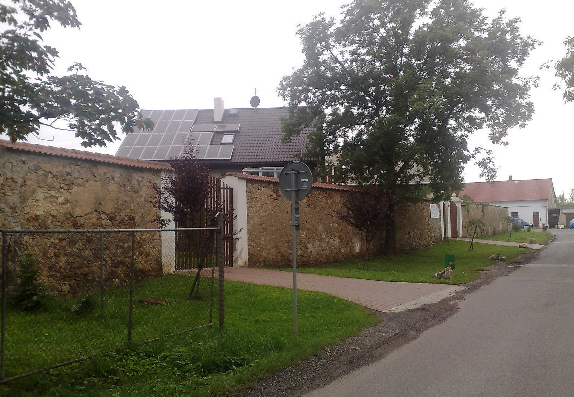 Mirešice